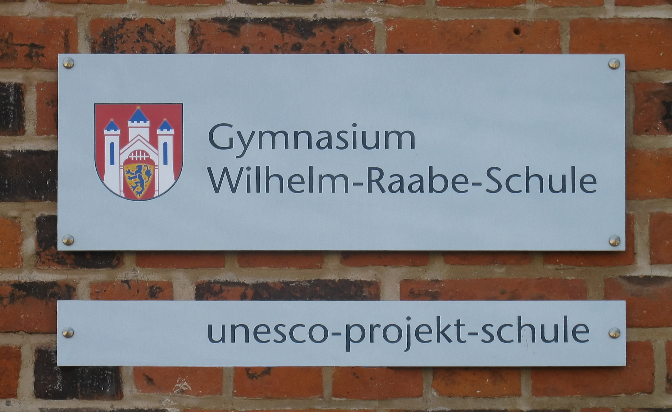 Wilhelm-Raabe-Schule in Lüneburg